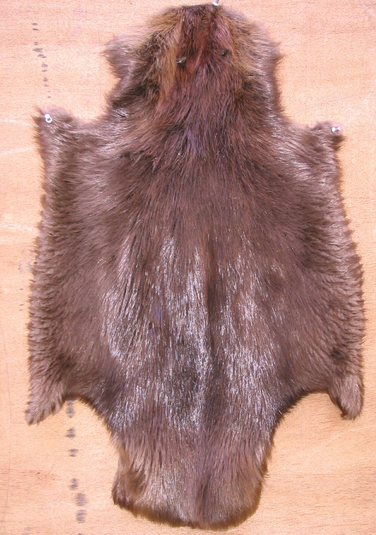 Beaver skin - Biberfell. Fachbezeichnung der Rauchwarenbranche: Spitzbiber